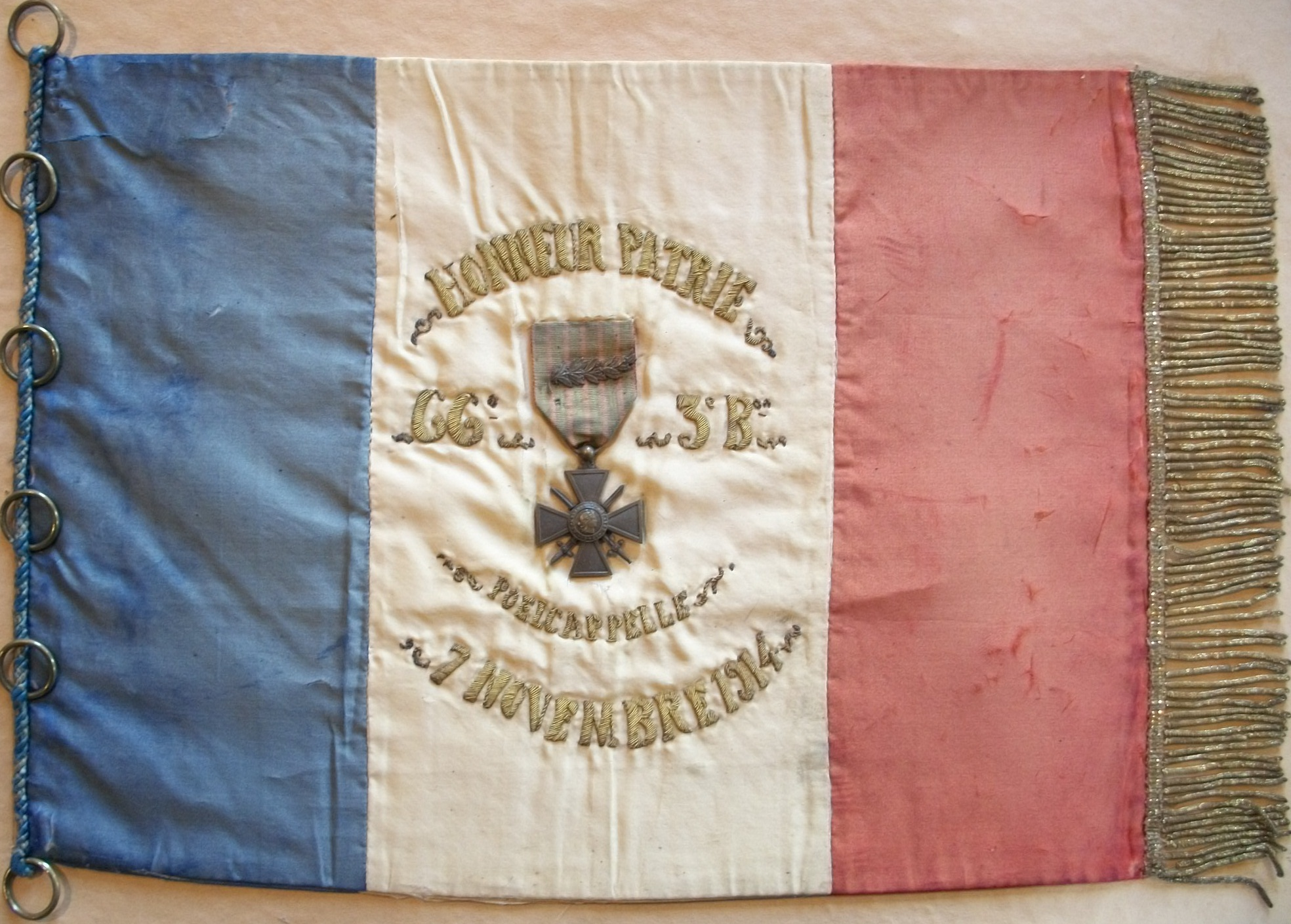 Fanion du 3e bataillon du 66e régiment d'infanterie.